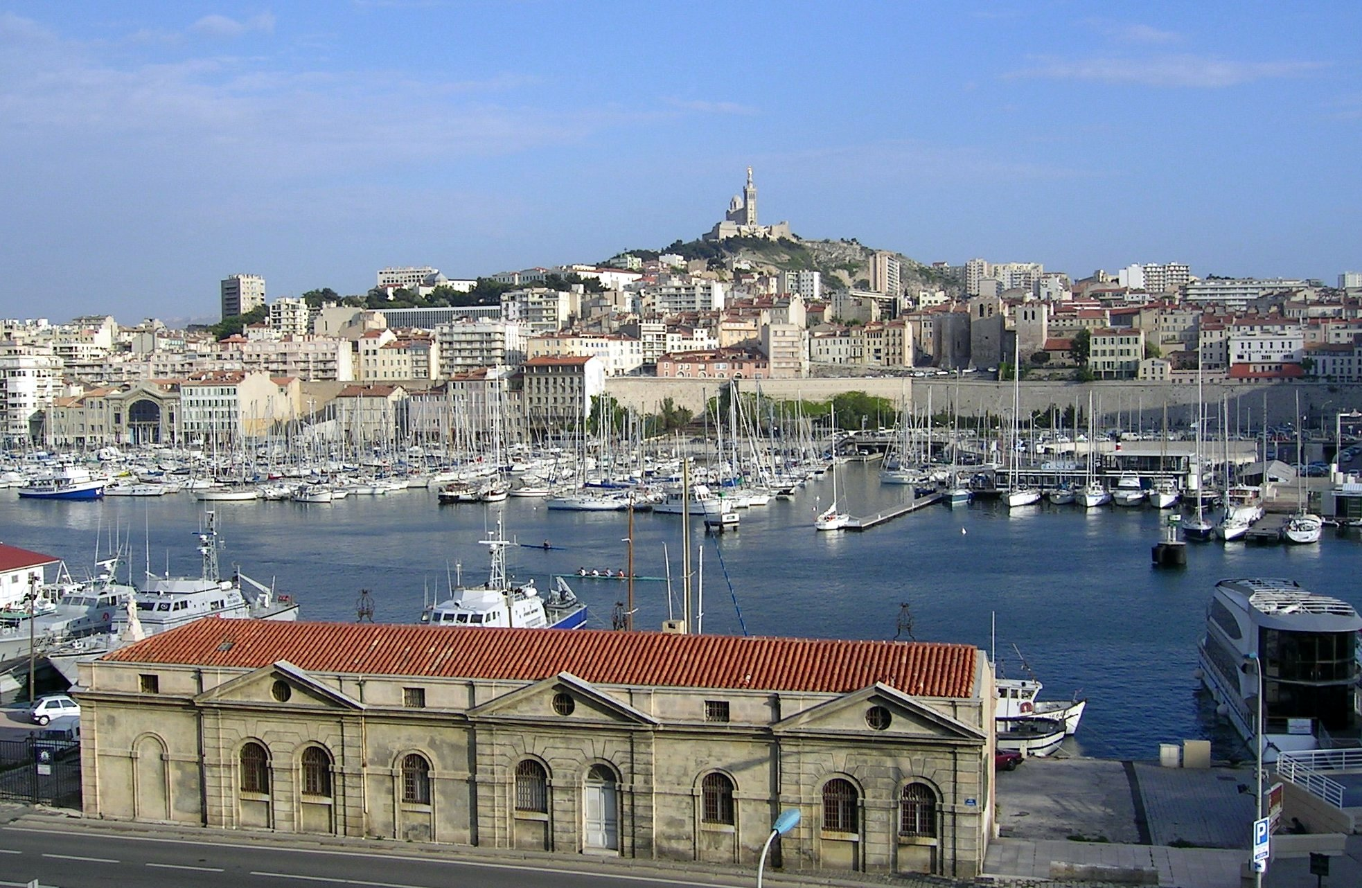 Description: The Old Port of Marseille, France. In the background, the Basilique Notre Dame de la Garde Source: own picture (Thomas Rosenau, User:Pumbaa80) Date: see metadata section below Other versions: Image:Vieux port de Marseille.jpg Description: Le vieux port de Marseille. Au fond: Notre-Dame de la Garde Source: Image prise par Thomas Rosenau (User:Pumbaa80) Date: voir ci-dessous (section «Metadata») Autres versions: Image:Vieux port de Marseille.jpg